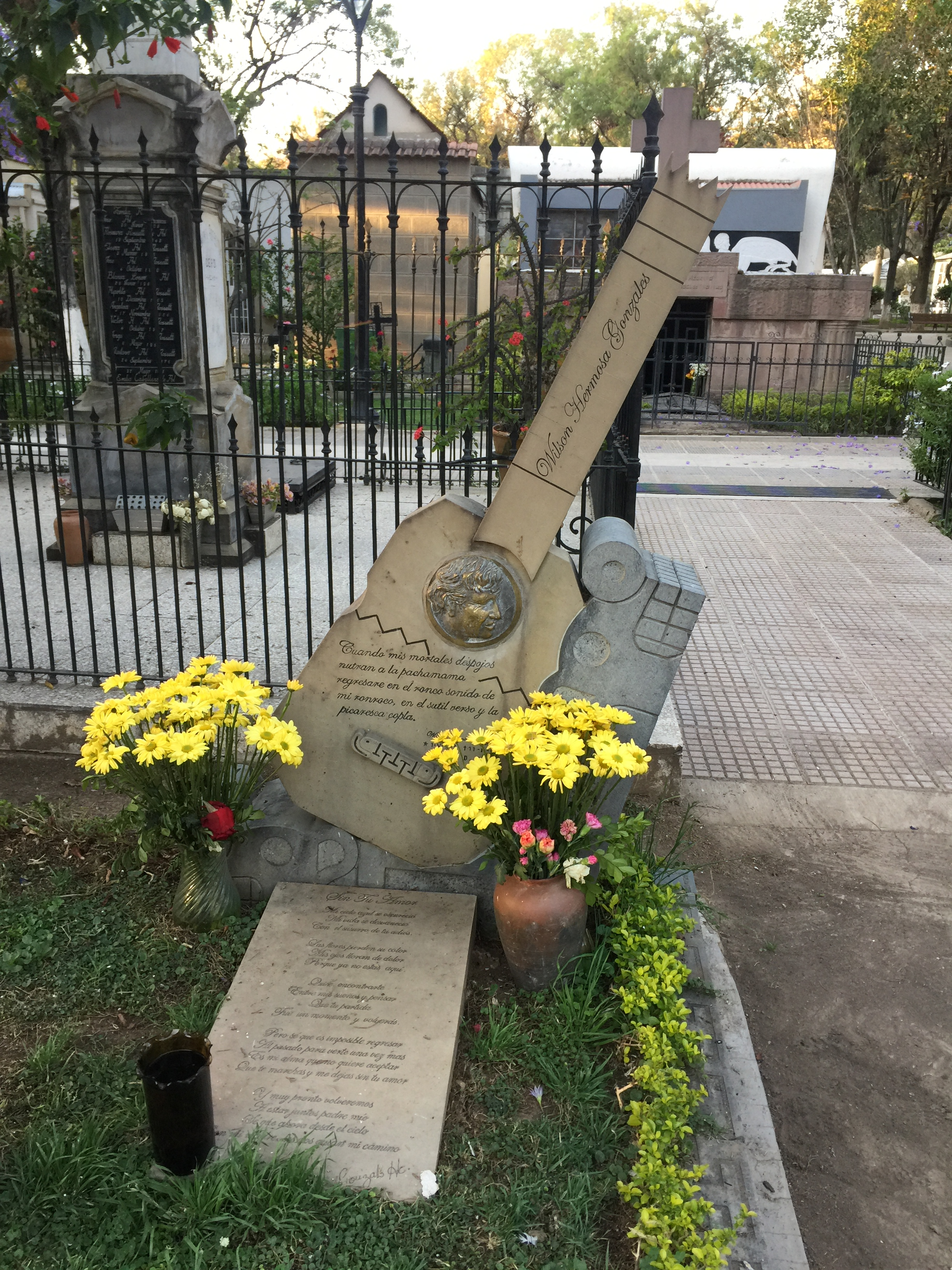 Cementerio General de Cochabamba This medium shows the protected monument with the number C/F0-001 in Bolivia.